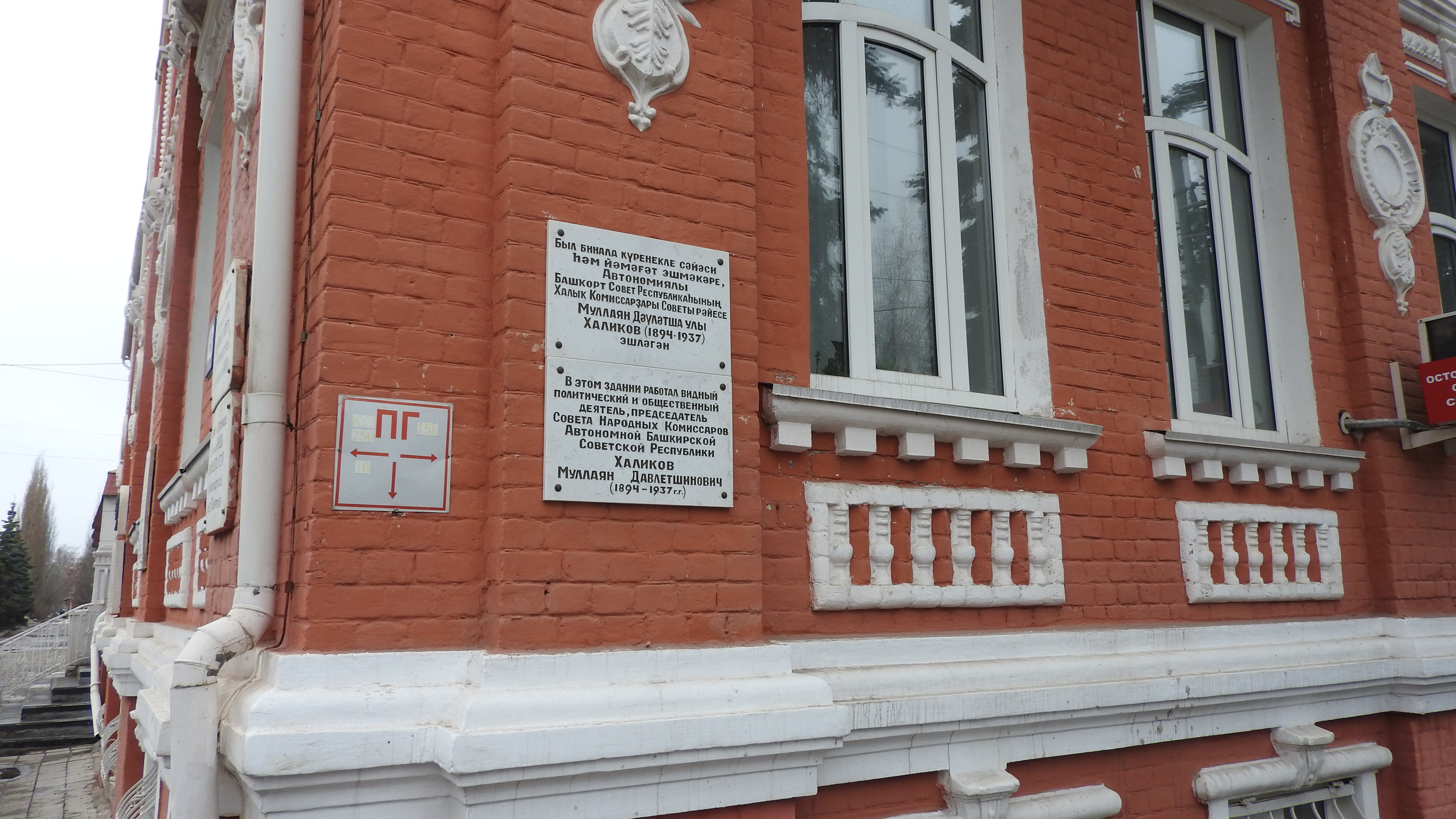 Стерлитамак ул.Карла Маркса 103